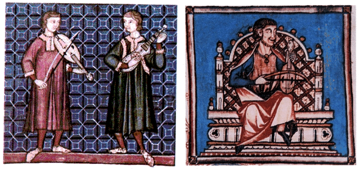 Две миниатюры из сборника Las Cantigas de Santa Maria, составленном при короле Кастилии Альфонсе X (XIII с.)